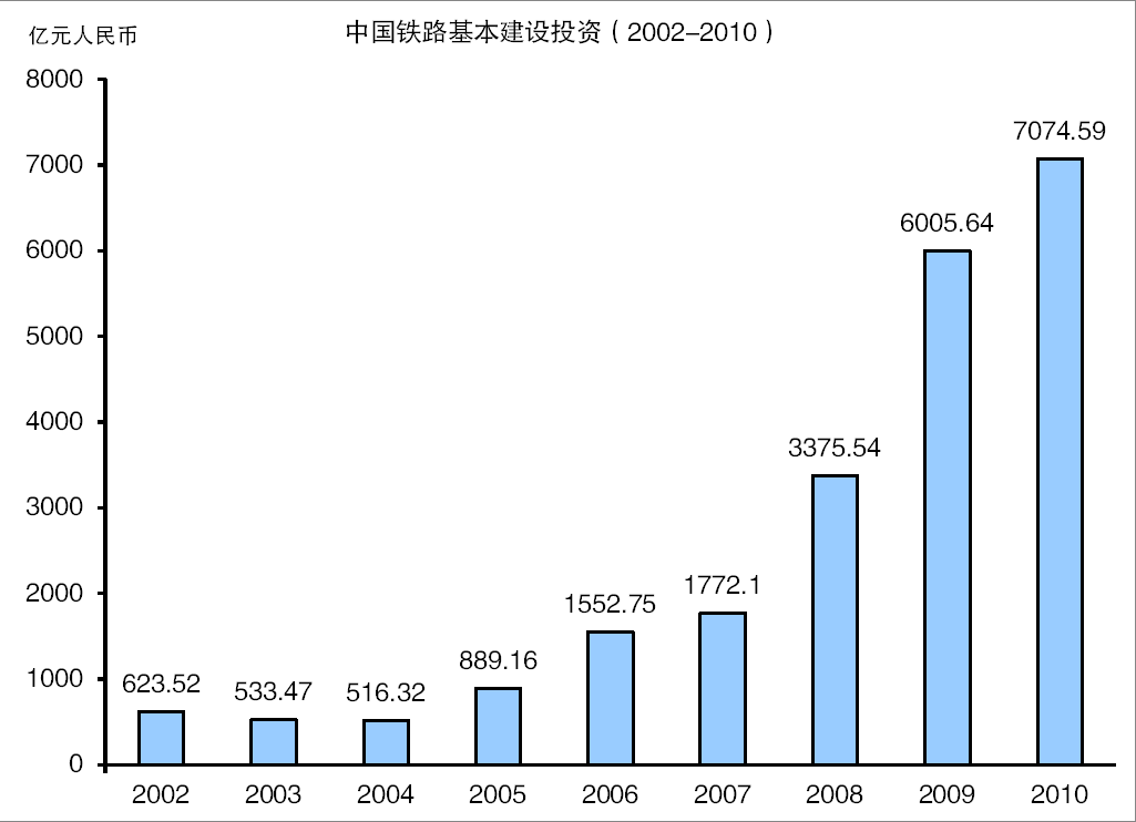 中国铁路基本建设投资（2002-2010年）。数据来源于历年《铁道统计公报》。